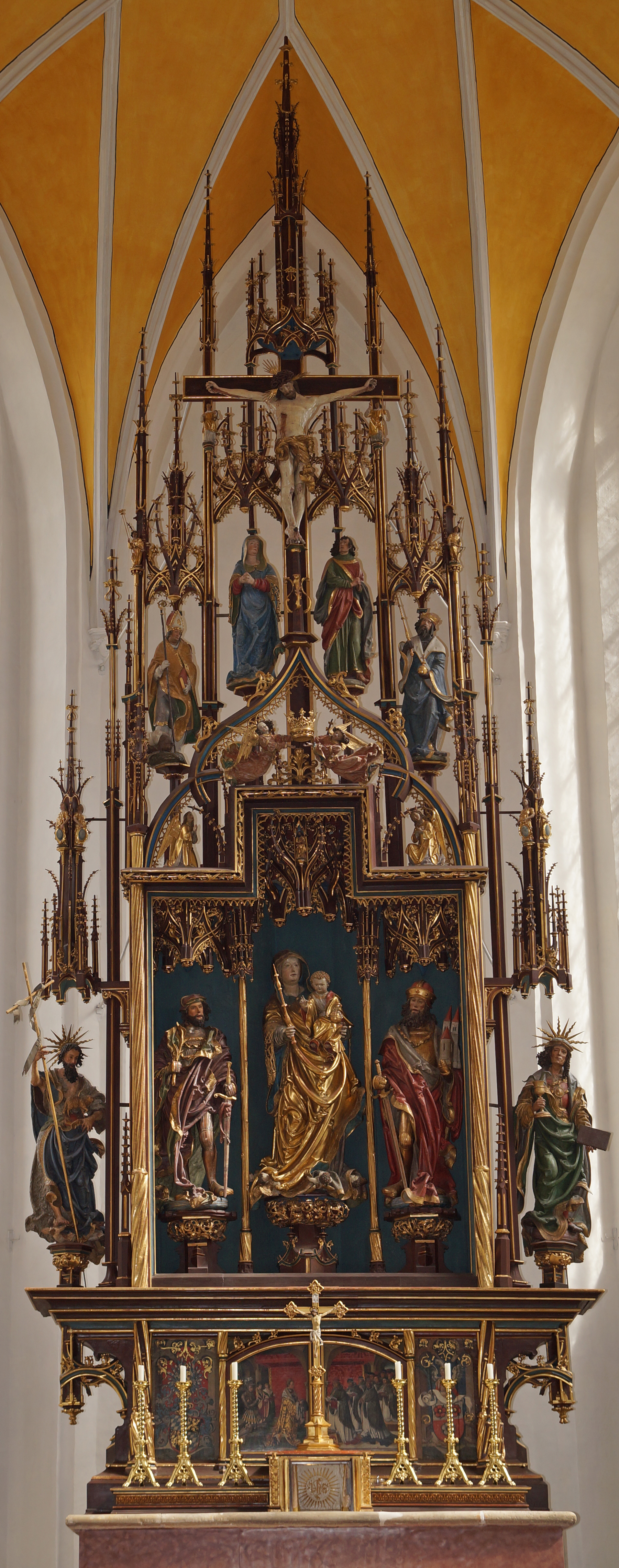 Leinberger-Altar im Kastulusmünster von Moosburg an der Isar. Hans Leinberger (1480–1531) Alternative names Lemberger, HannsDescriptionGerman sculptorDate of birth/death circa 1480 date QS:P,+1480-00-00T00:00:00Z/9,P1480,Q5727902 1531 or laterWork periodcirca 1510 date QS:P,+1510-00-00T00:00:00Z/9,P1480,Q5727902–1530Work location Landshut Authority control : Q896372 VIAF: 22690885 ISNI: 0000 0000 8364 2287 ULAN: 500007567 LCCN: n85124428 WGA: LEINBERGER, Hans WorldCat creator QS:P170,Q896372